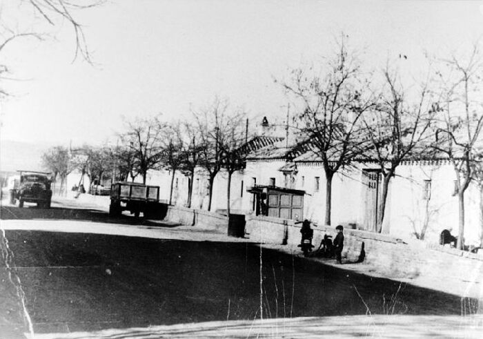 La Gran Vía de Majadahonda en 1940, al terminar la Guerra Civil.